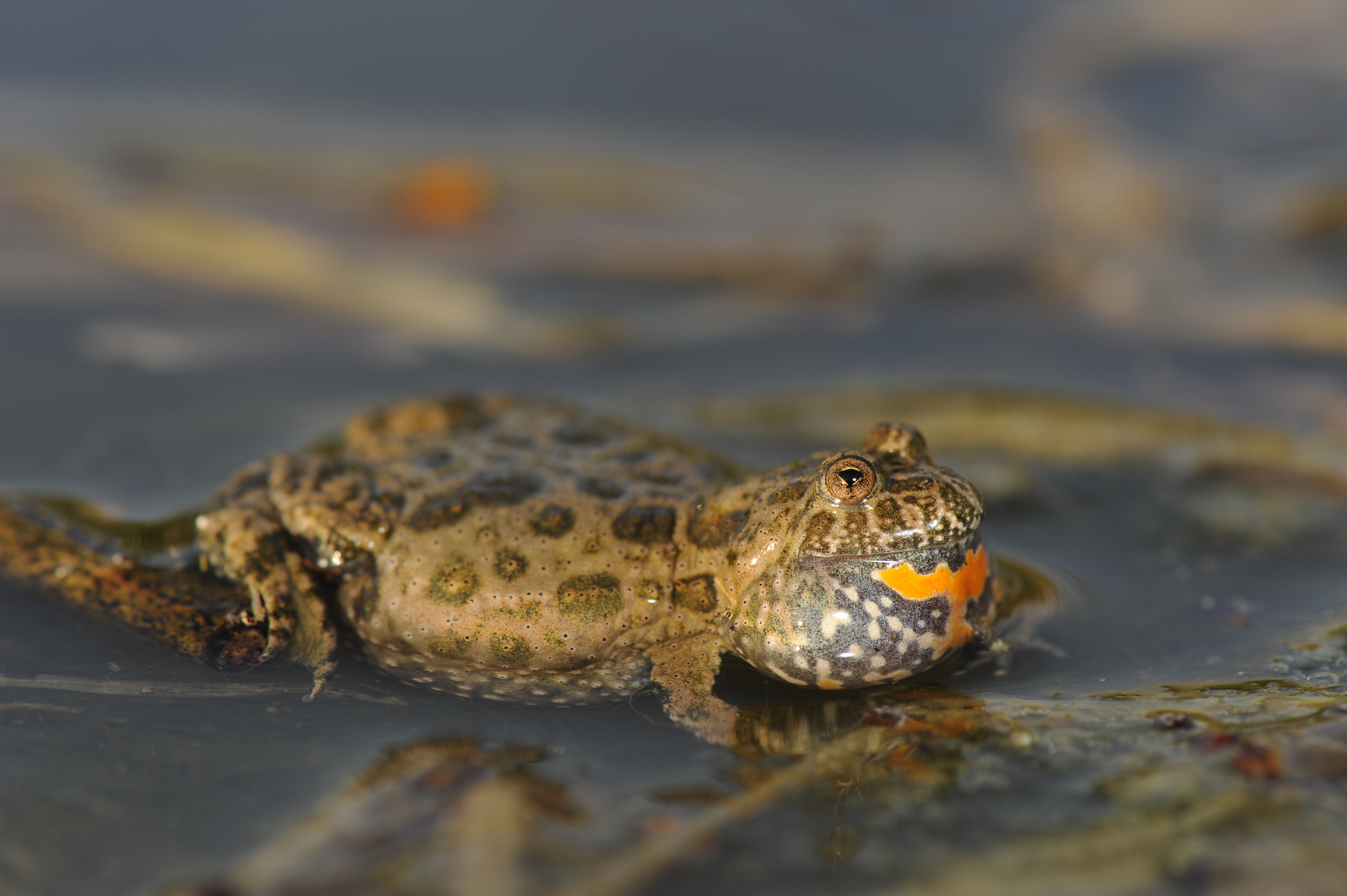 Rufende Rotbauchunke aus Brandenburg